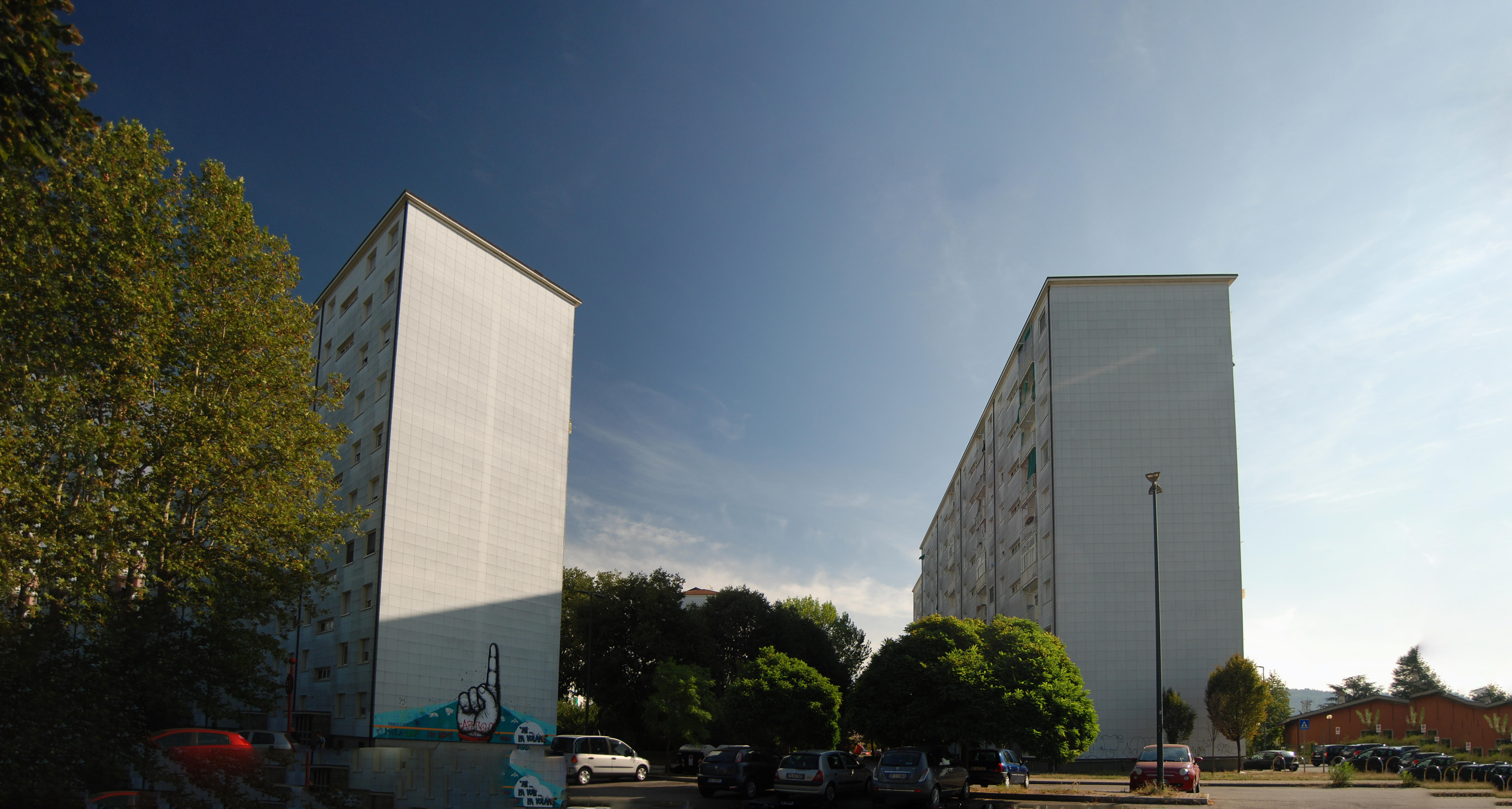 Alcuni palazzi del quartiere residenziale di Via Artom